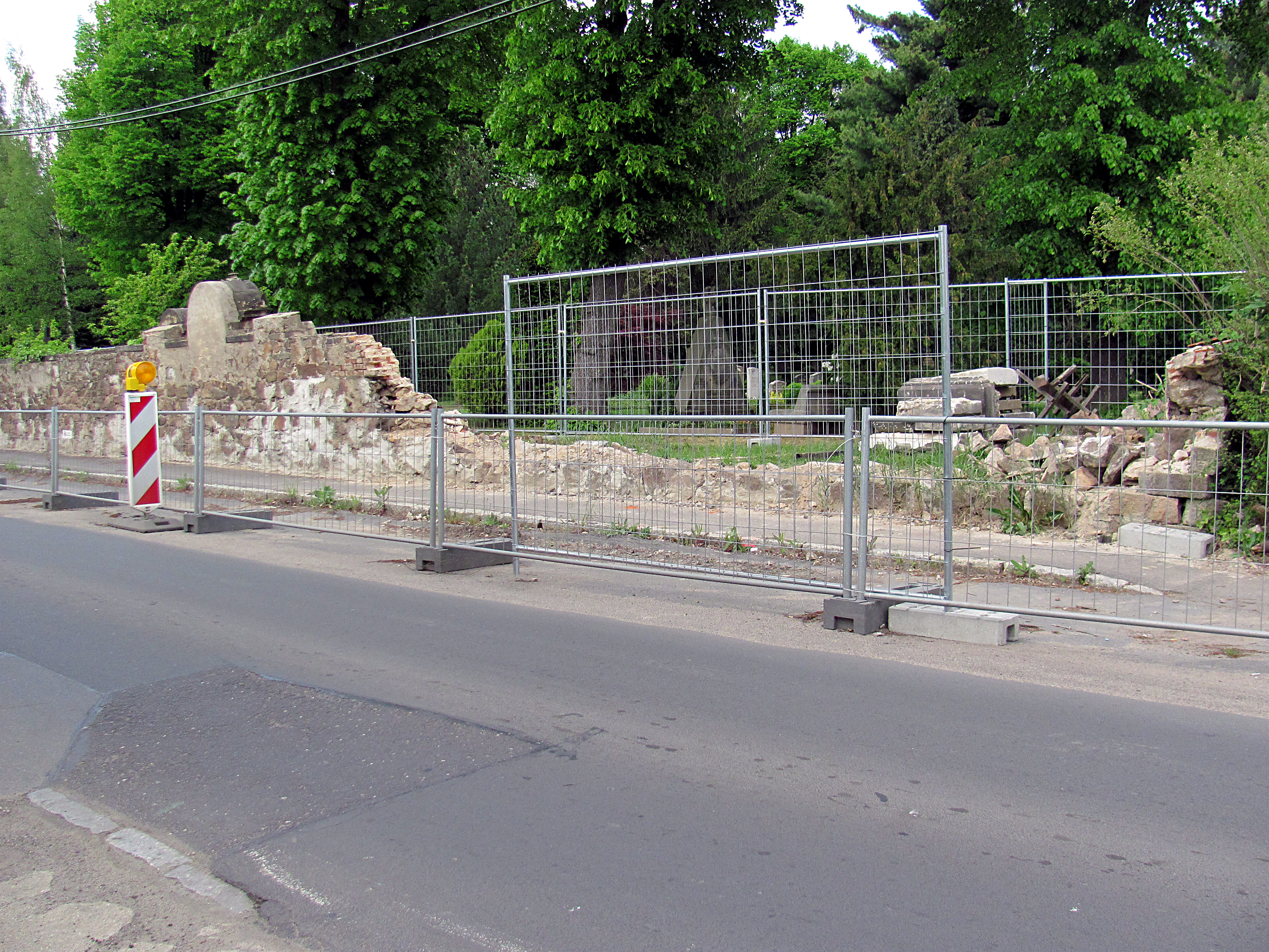 Friedhof Radebeul-West, Friedhofsmauer an der Kötzschenbrodaer Straße, 2014 teilweise eingefallen. Im Hintergrund das Grabmal Schuch